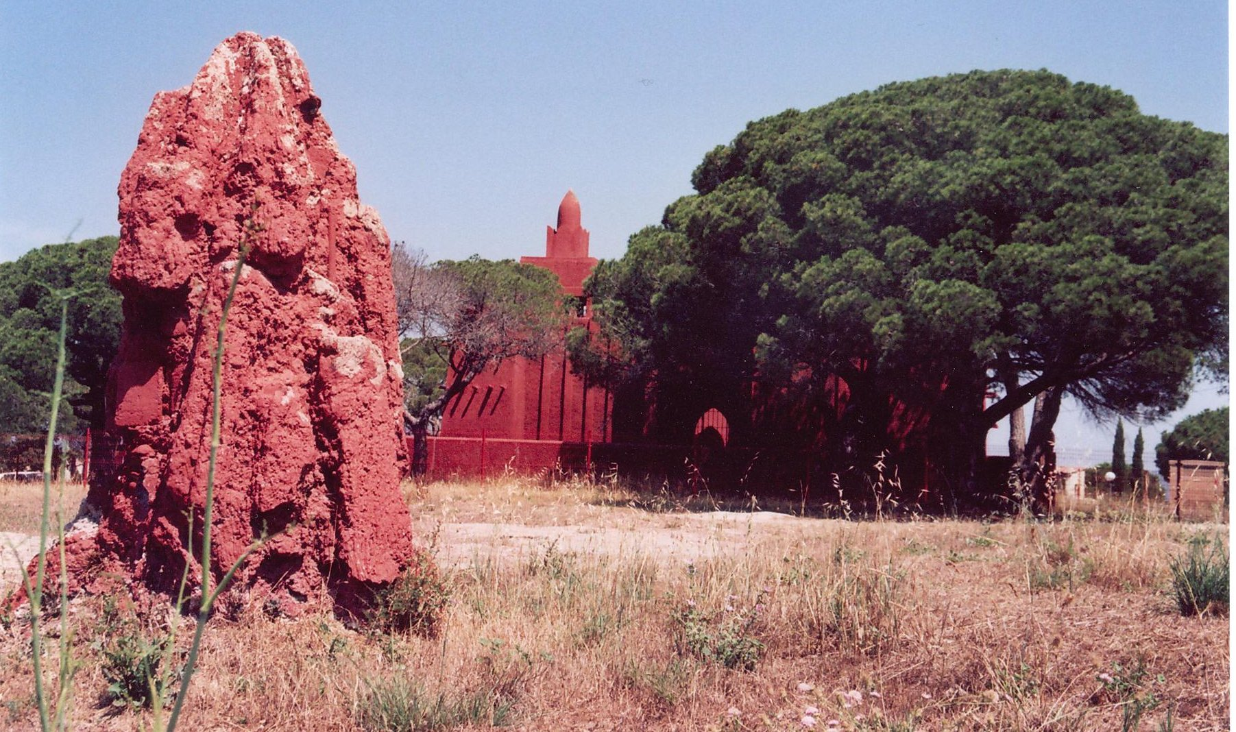 Mosque Missiri (Frejus)